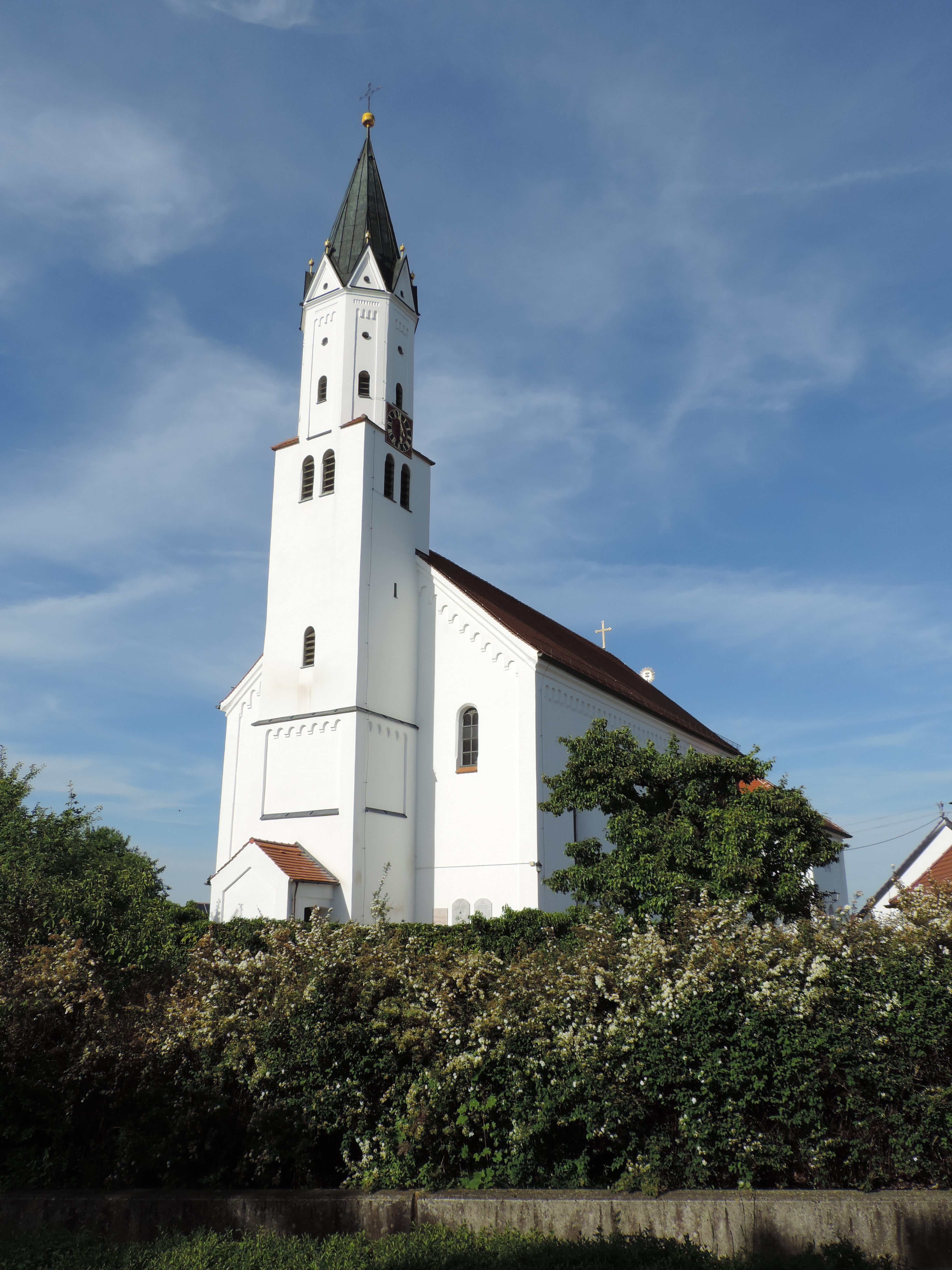 Westseite